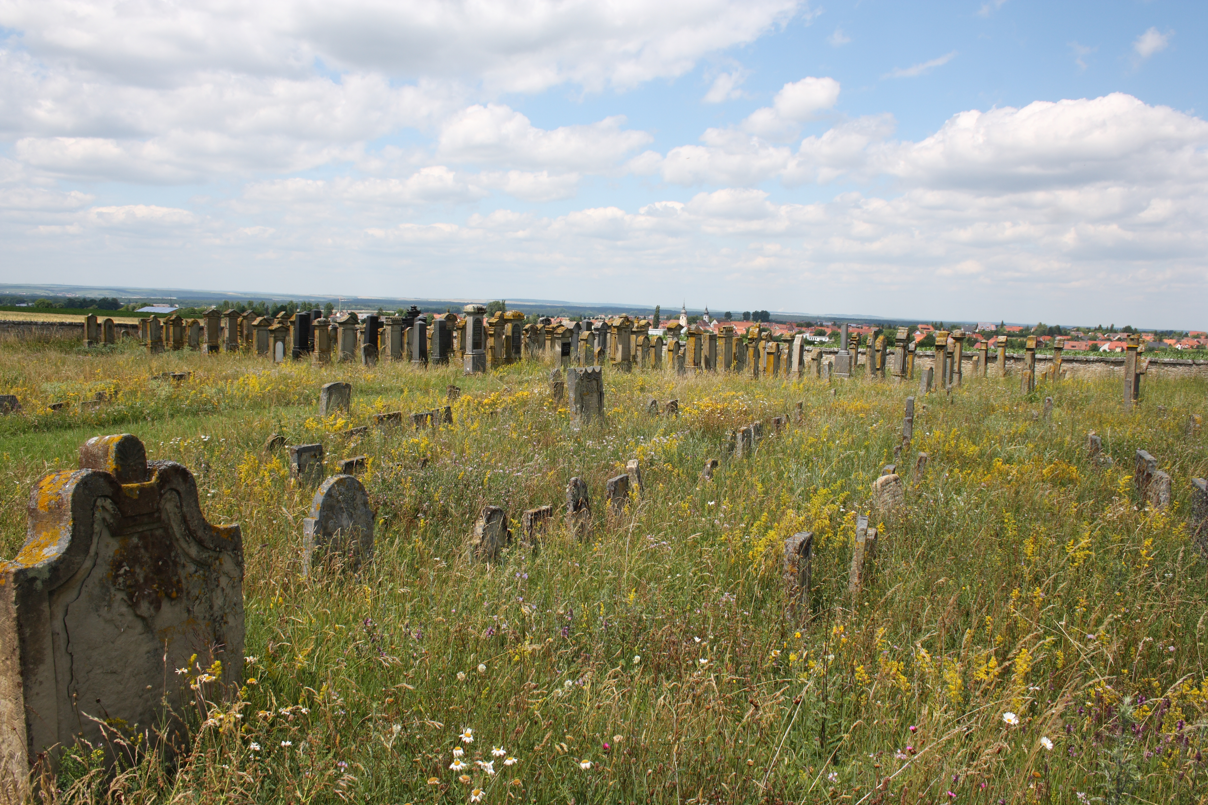 Jüdischer Friedhof in Rödelsee im Landkreis Kitzingen (Bayern)